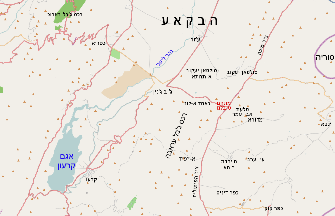 Map of Bakaa valey